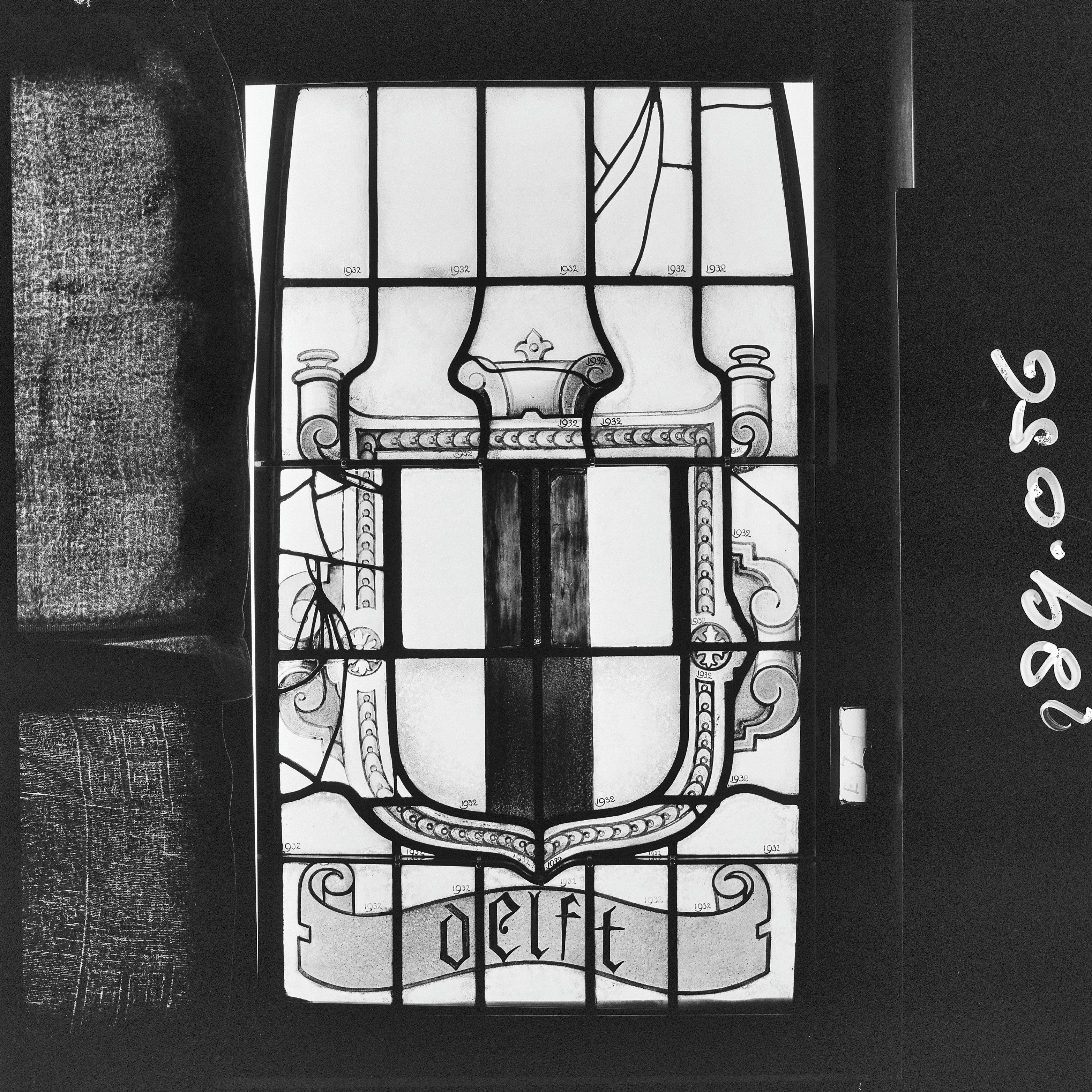 NEDERLANDS HERVORMDE KERK ( GROTE KERK ): INTERIEUR, GLAS IN LOODRAAM, RAAM 7, PANEEL WAPEN VAN DELFT